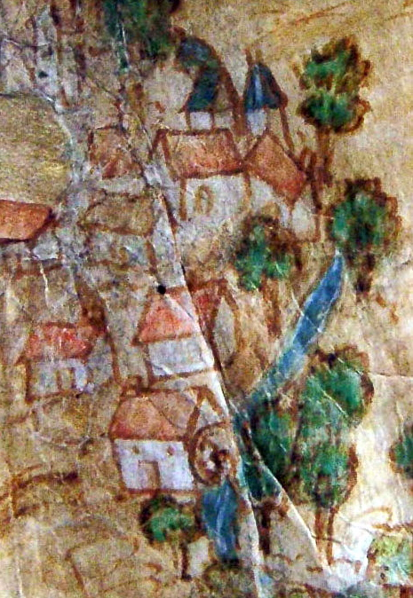 Rosoy, la Gergogne et le moulin. Au fond la ferme et le château.